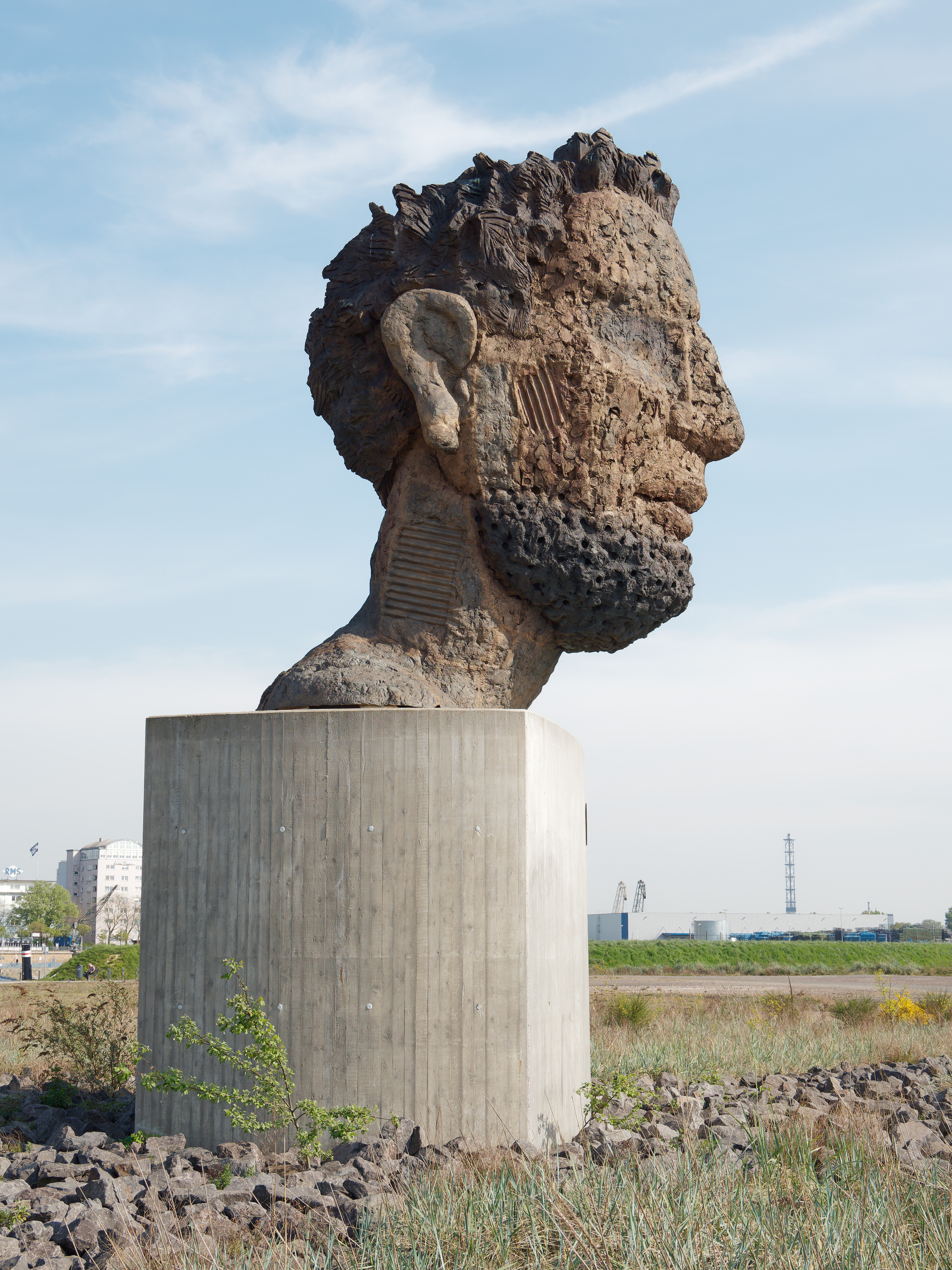 Bronzeskulptur Echo des Poseidon von Markus Lüpertz wurde im Jahr 2016 auf der Merkatorinsel in Duisbug-Ruhrort aus Anlass des dreihundertjährigen Hafenjubiläums aufgestellt. Sie besteht aus einer Kopfnachbildung aus Bronze auf einem viereinhalb Meter hohen Betonsockel.